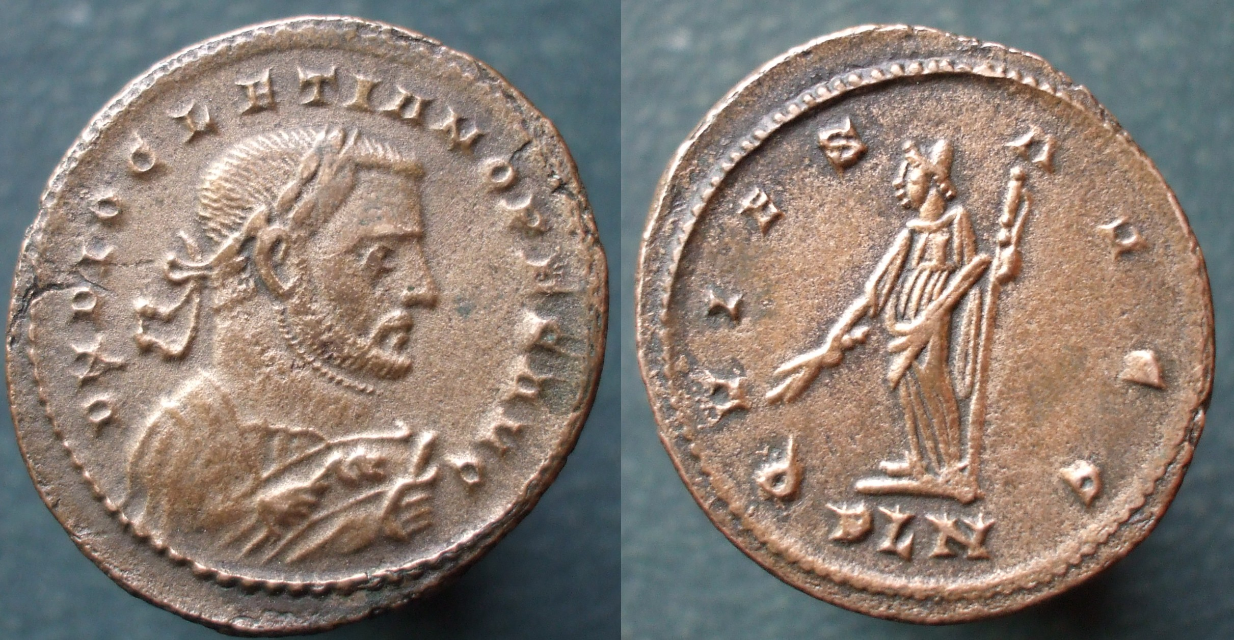 nummus de Dioclétien Diocletianus, buste consulaire, revers Quies, Londres